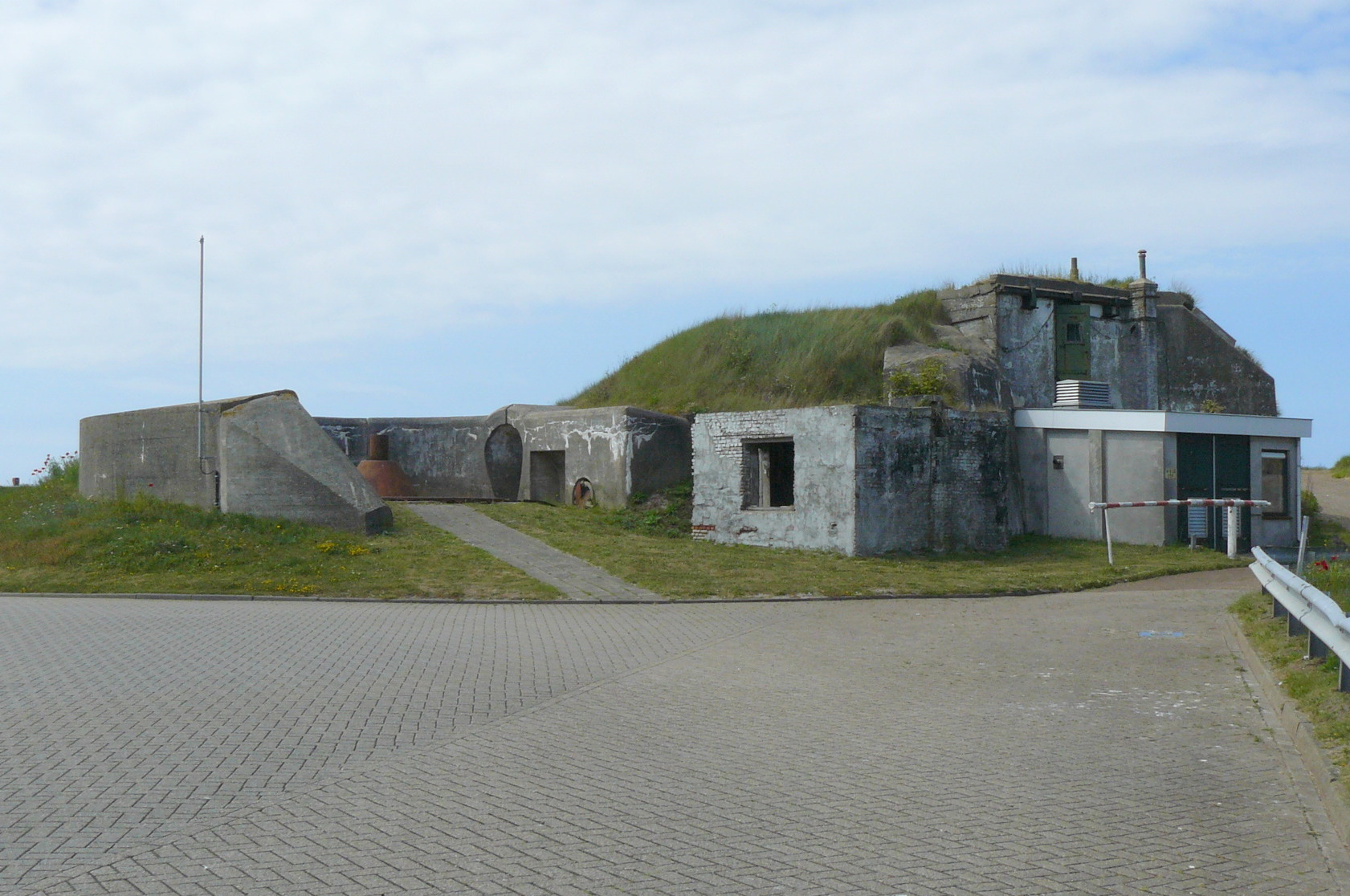 Naast het zeefront kwamen er ook opstelplaatsen voor kanonnen om naderende schepen te bestoken met granaten. Deze staat direct ten westen van gebouw Gelderland bij de huidige ingang. Hier stond aanvankelijk ook een kanon met een kaliber van 24 cm opgesteld.